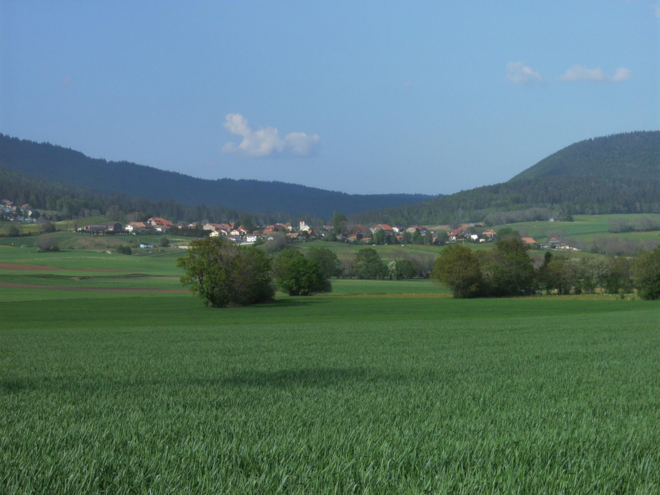 Nods (BE, Suisse)